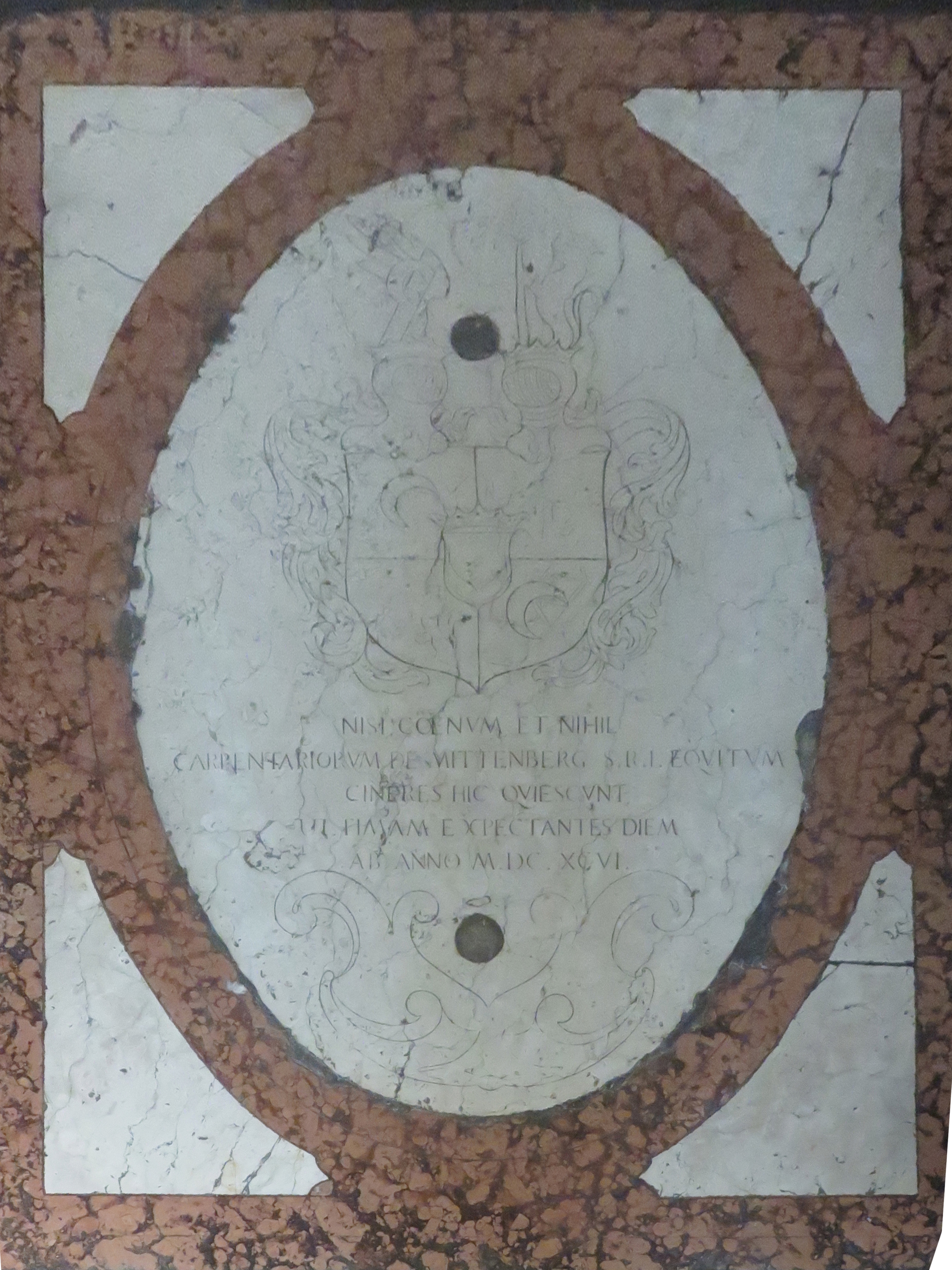 Lastra tombale della famiglia Carpentari nella Chiesa di Loreto, a Rovereto